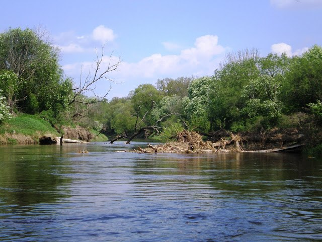 Medžių išvartų gausa Nevėžyje ties Pašiliais, Kėdainių raj.